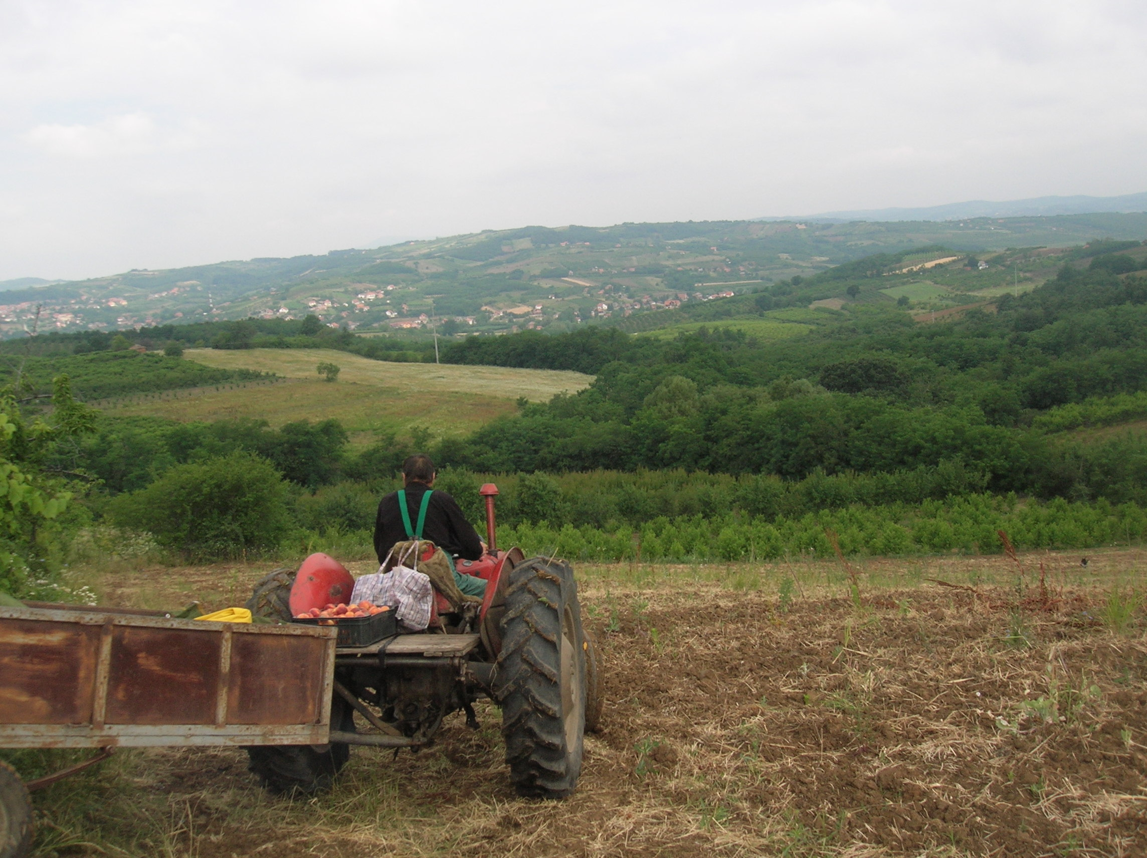 Begaljica